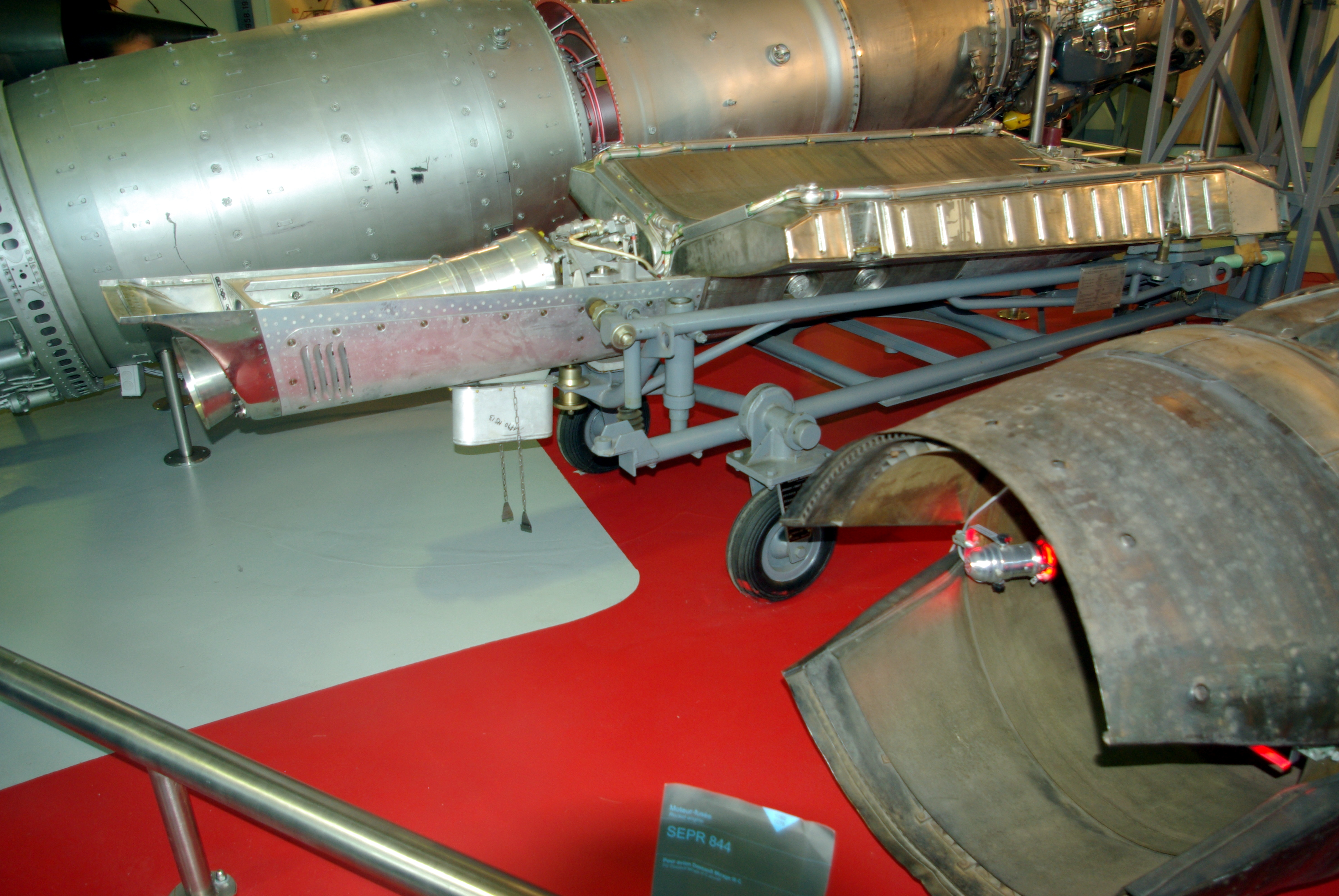 Moteur-fusée SEPR 844 présenté au musée Safran.